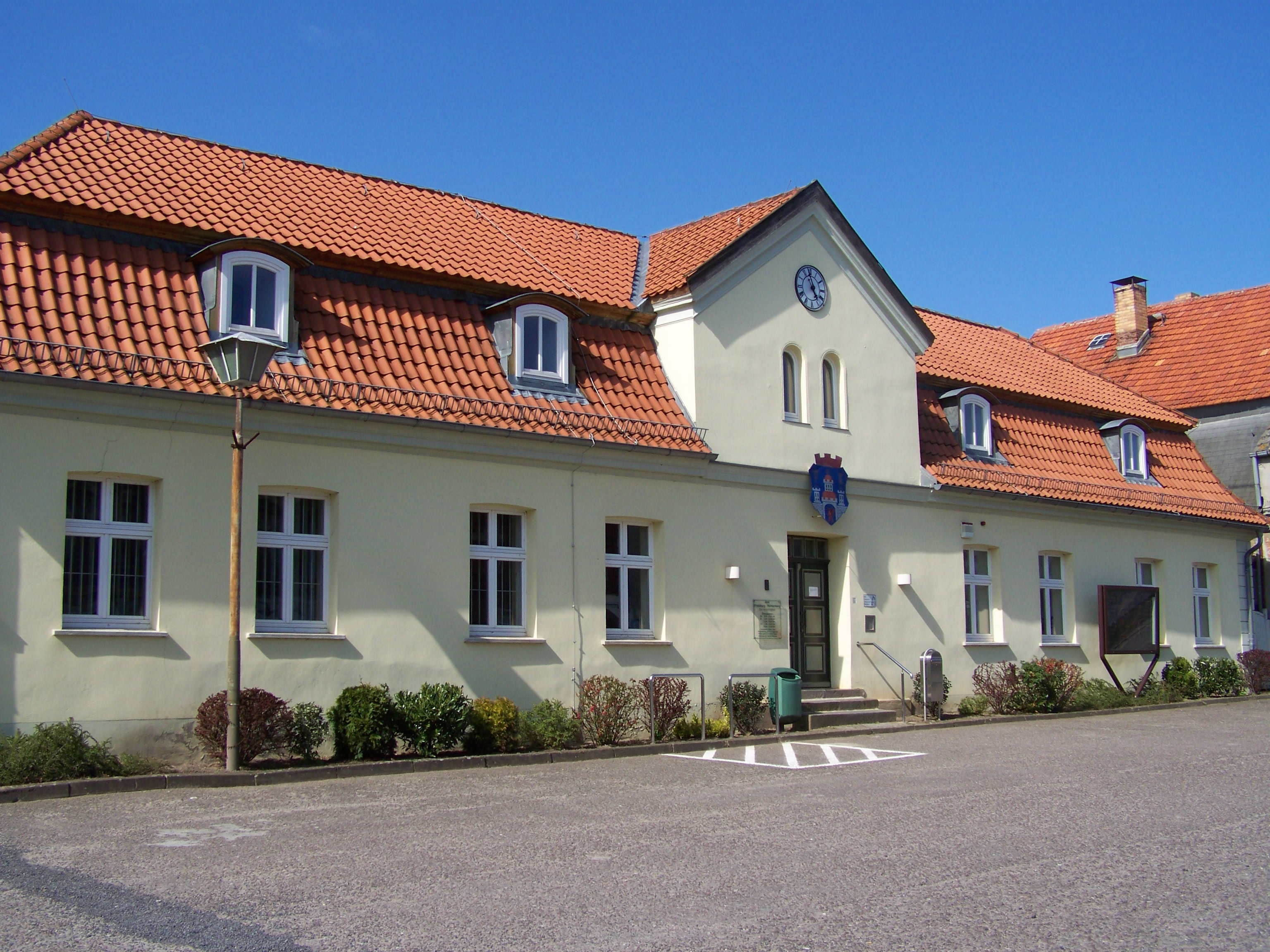 Franzburg, Rathaus (2008-04-20)